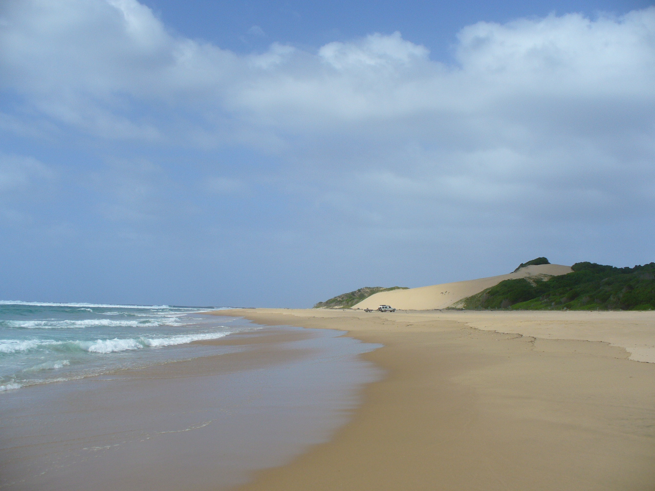 Ao sul de Maputo, perto da fronteira com a África do Sul.